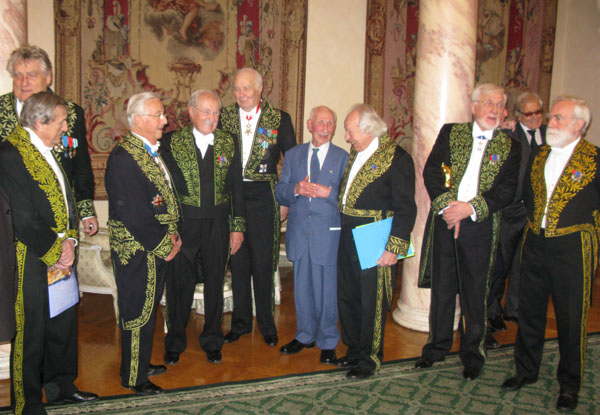 Marino di Teana reçu à l'Académie des Beaux-Art, reçoit le prix "Commandant Weiller". Mécène : Pilar de la Béraudière". Avec Arnaud d'Hauterives, secrétaire Perpétuel, Antoine Poncet, Président de l'académie, Leonardo Gianadda, Claude Parent, Jean Cardot, Pierre Caron, Yves Boiret et Gérard Lanvin.